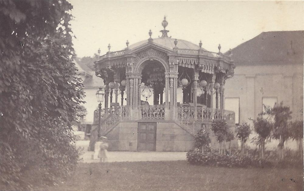 Der Musikpavillon Baden-Baden. Aufnahme im CDV-Format von Gottlieb Theodor Hase in Freiburg i. Br. um 1870.